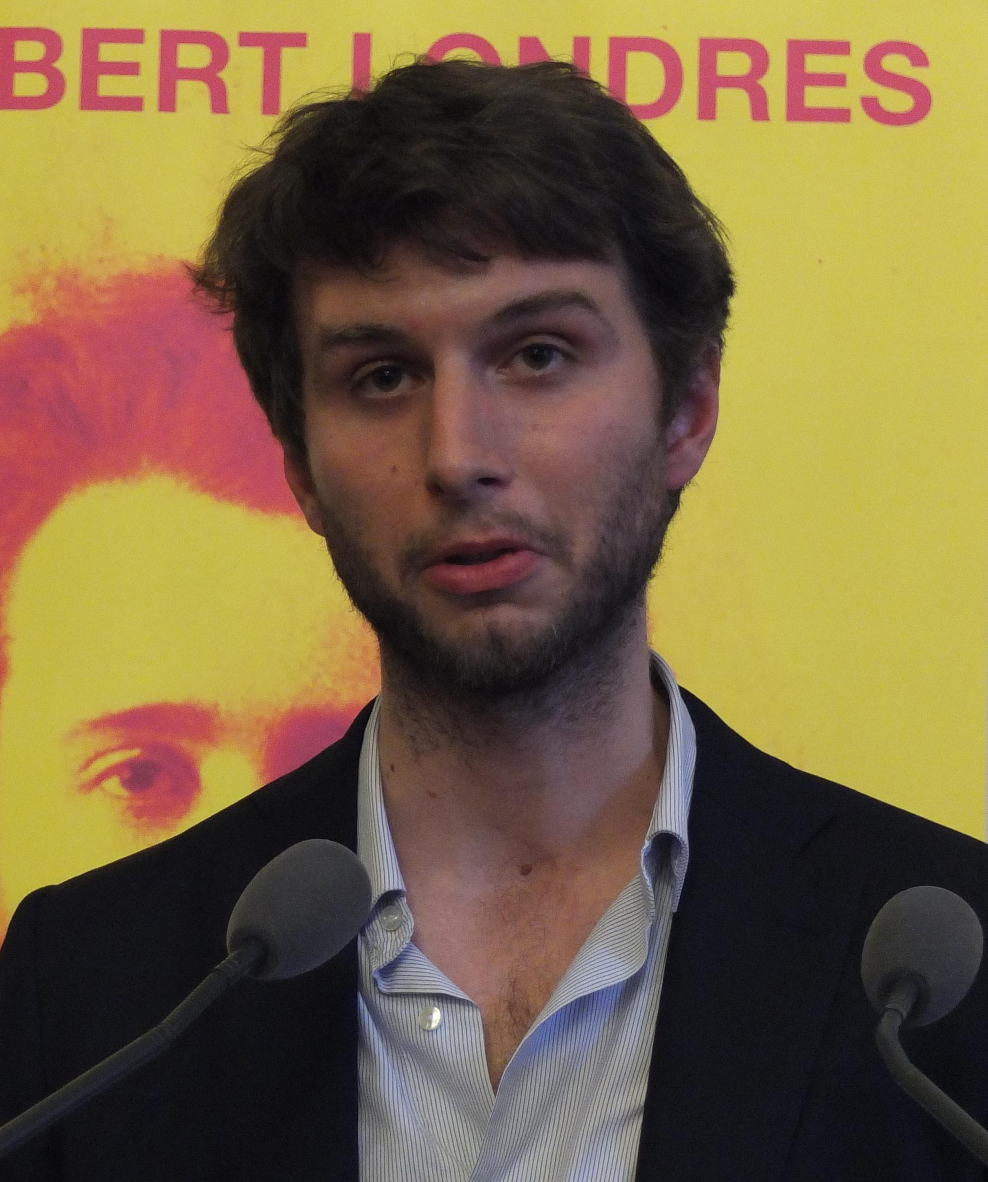 Remise du Prix Albert Londres 2012 au Sénat à Paris